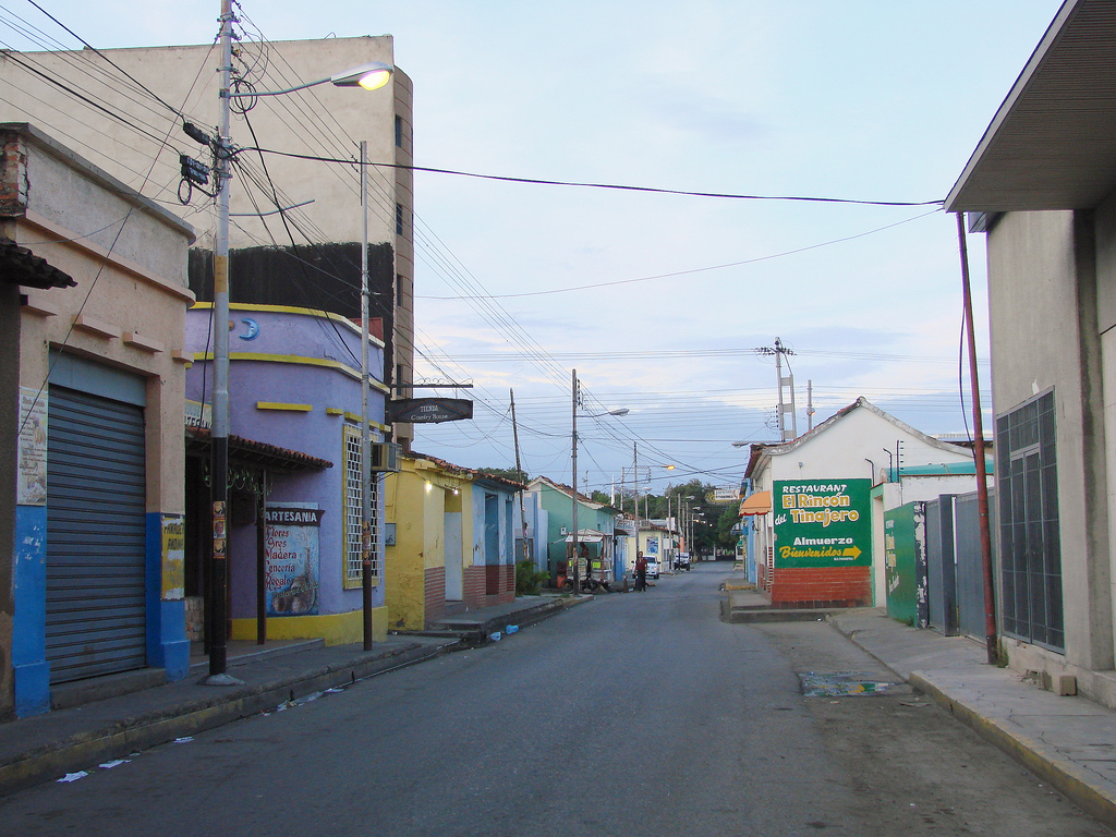 Calle del Centro de Cagua, Venezuela.